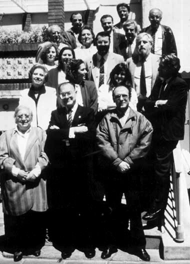 Josep Maria Ainaud de Lasarte i l'equip del grup municipal a l'Eixample